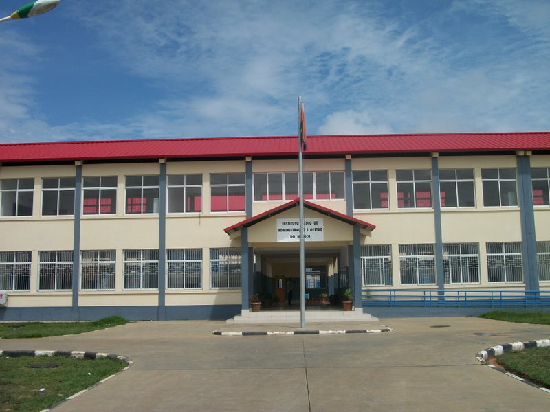 Foto frontal do Instituto Médio de Administração e Gestão do Luena, localizado na província do Moxico, em Angola.